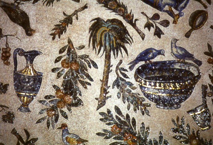 Mosaic from Santa Costanza, Rome